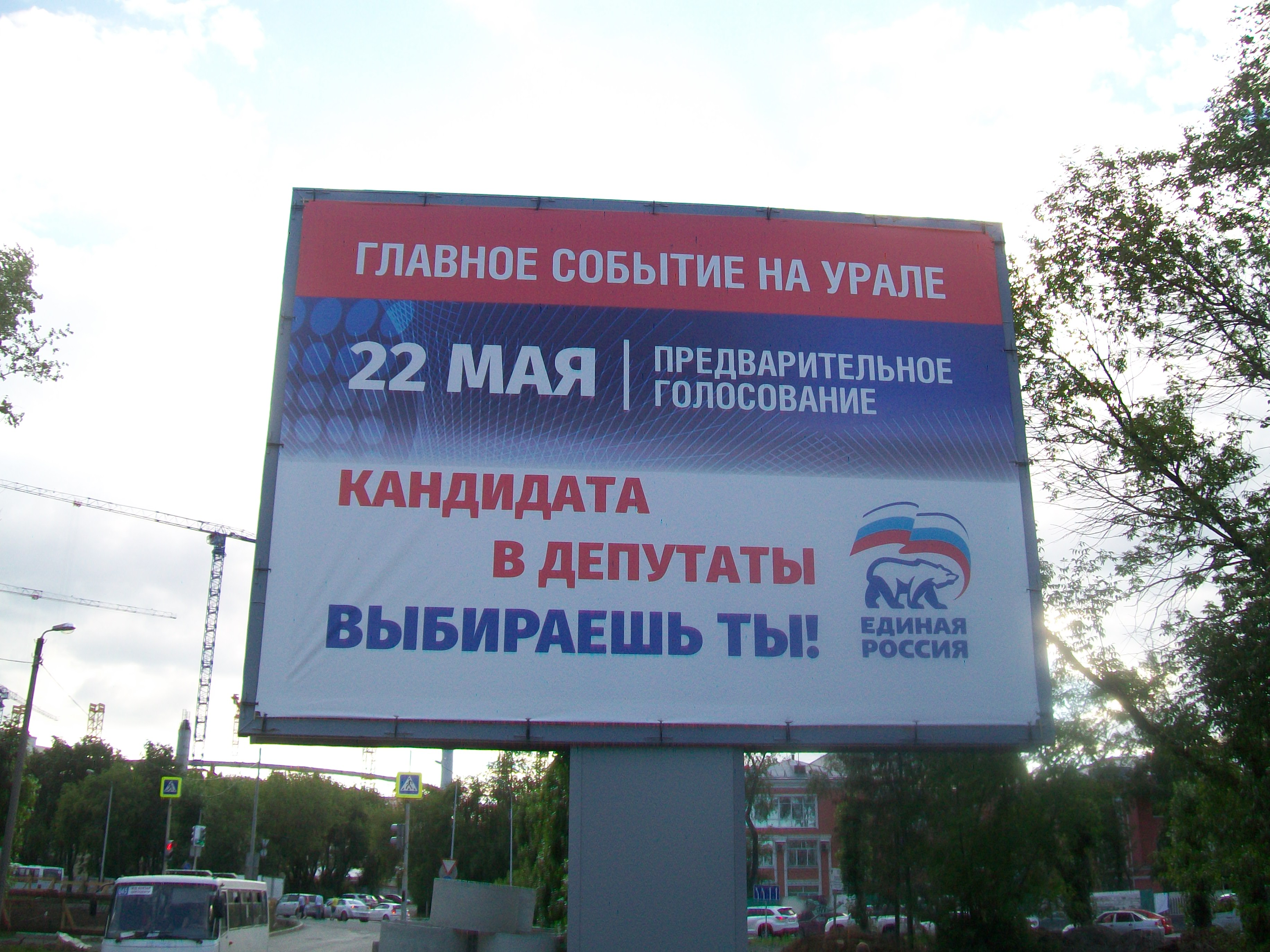 Щит, призывающий идти на праймериз "Единой России" (Екатеринбург, 2016 год)